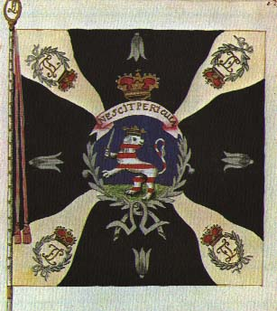 1783 Hessen-Kassel army - Fusilier Regiment von Knyphausen - banner